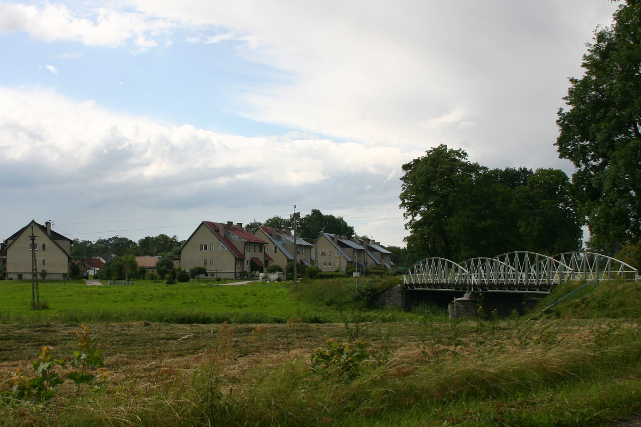 Prosna (deutsch Prassen) ist ein Dorf in Polen in der Wojewodschaft Ermland-Masuren. Es gehört zum Powiat Kętrzyński, Gemeinde Korsze.